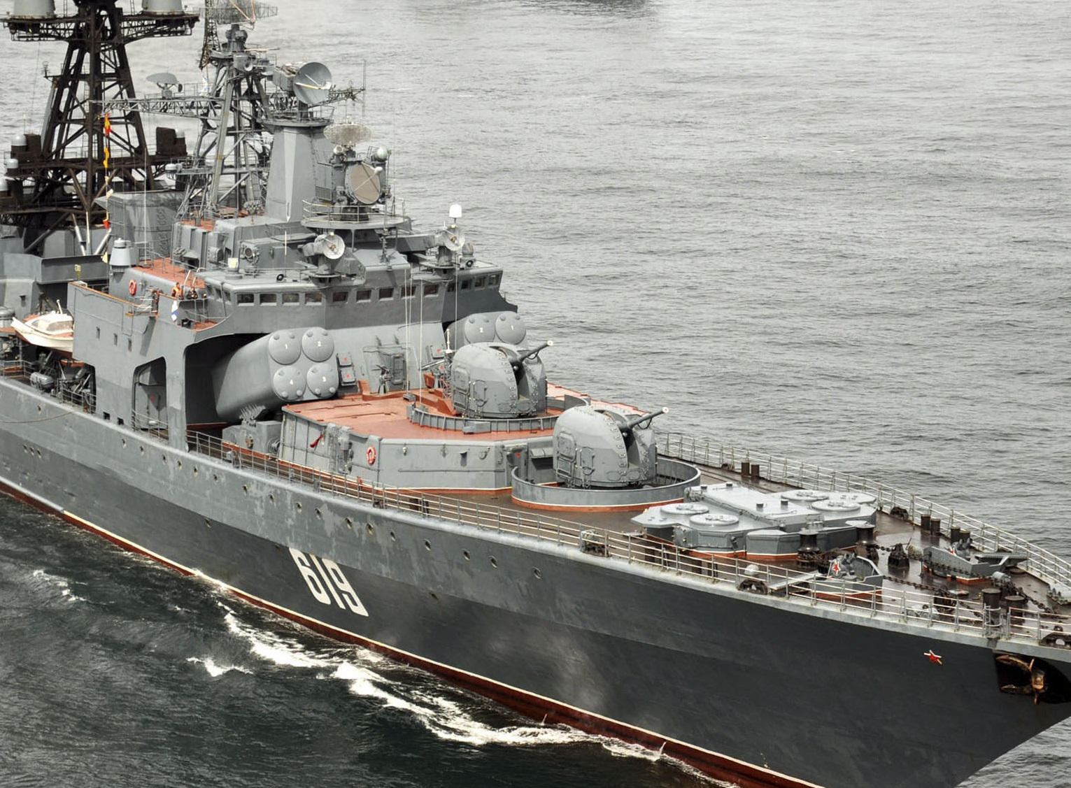 ウダロイ級甲板